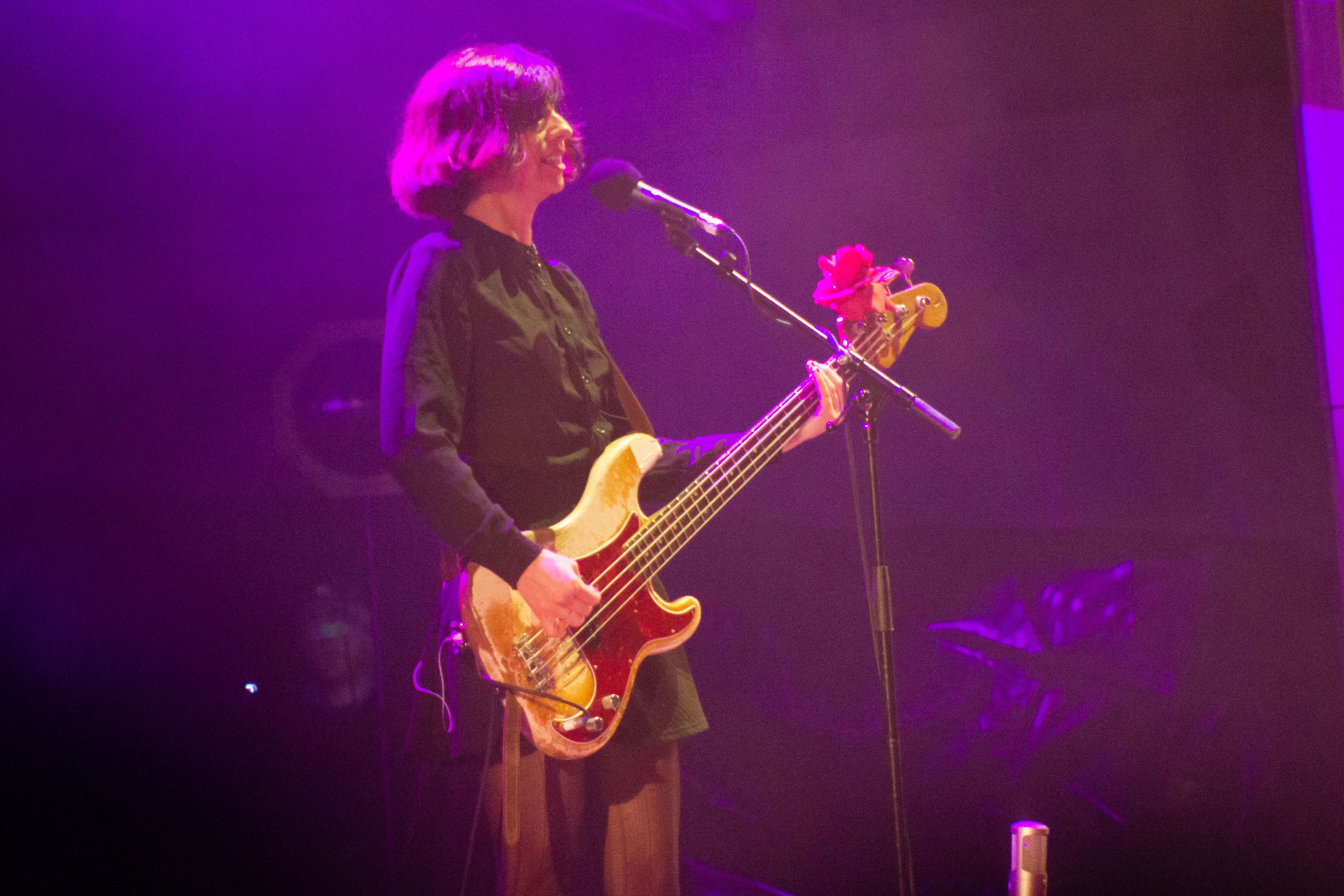 Paz Lenchantin actuando con Pixies no NOS Primavera Sound 2014 de Porto.